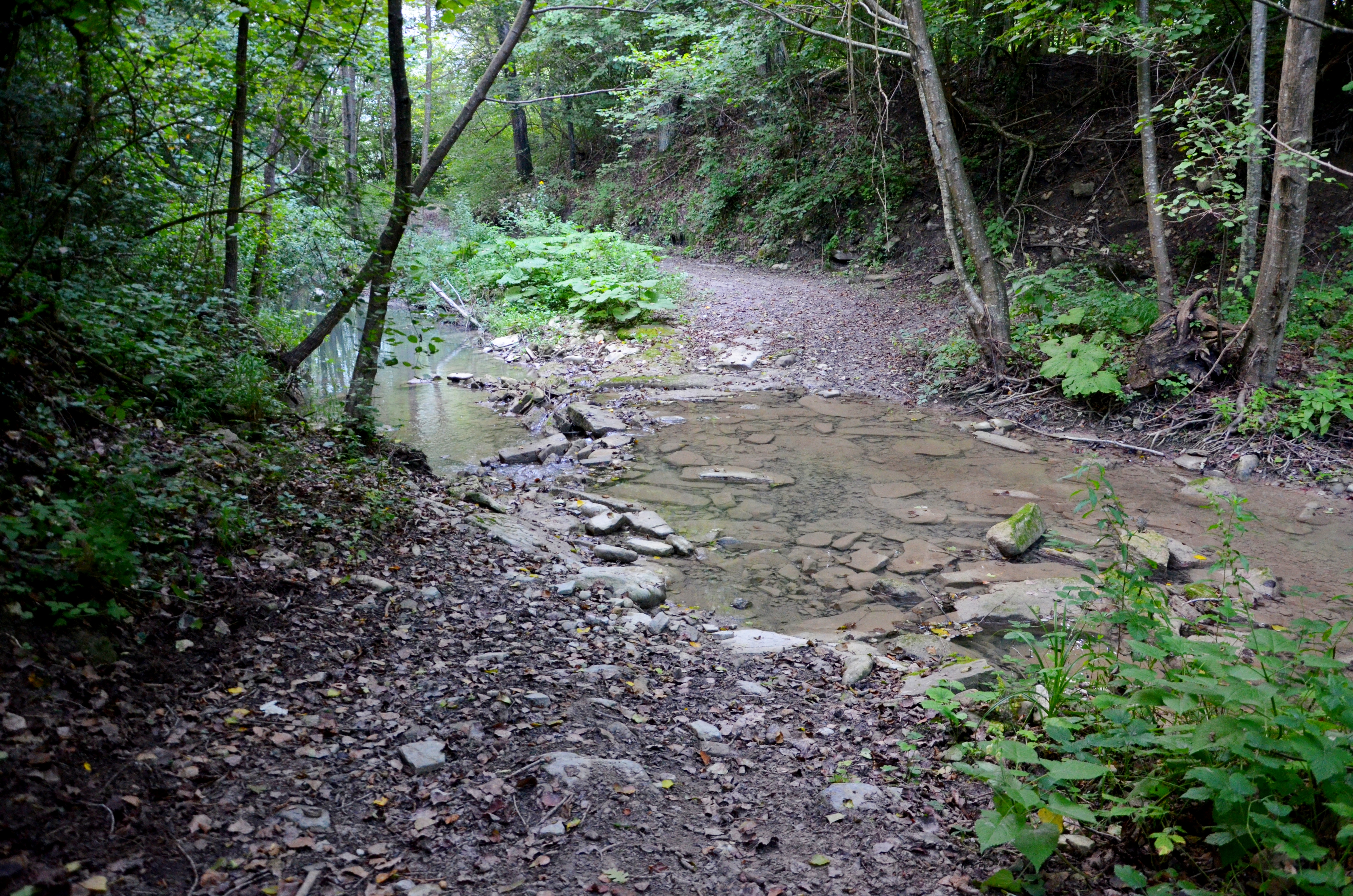 Torrente Arzola di Murazzano. Le acque